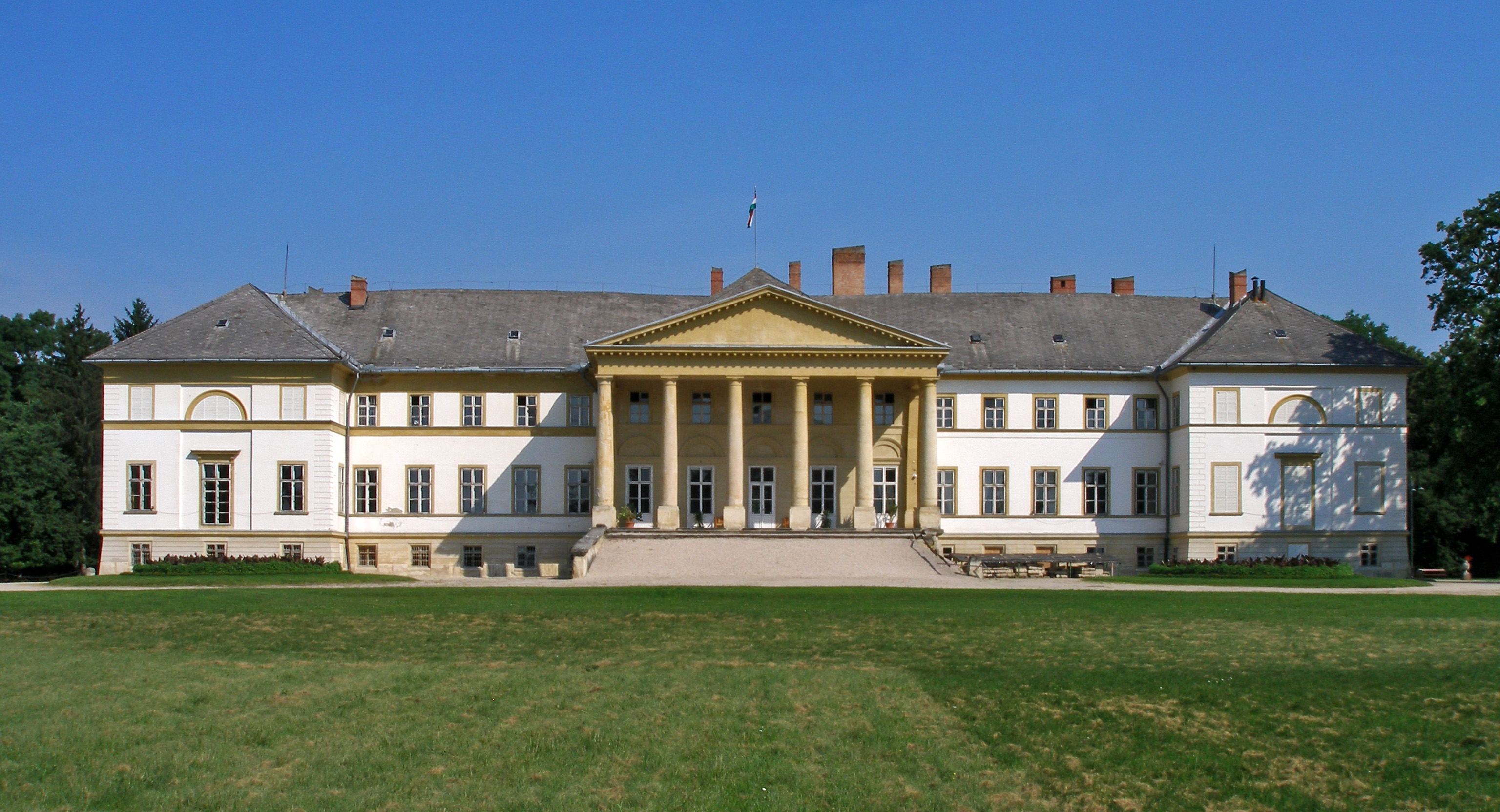 Festetics-kastély, Dég This is a photo of a monument in Hungary. Identifier: 3602